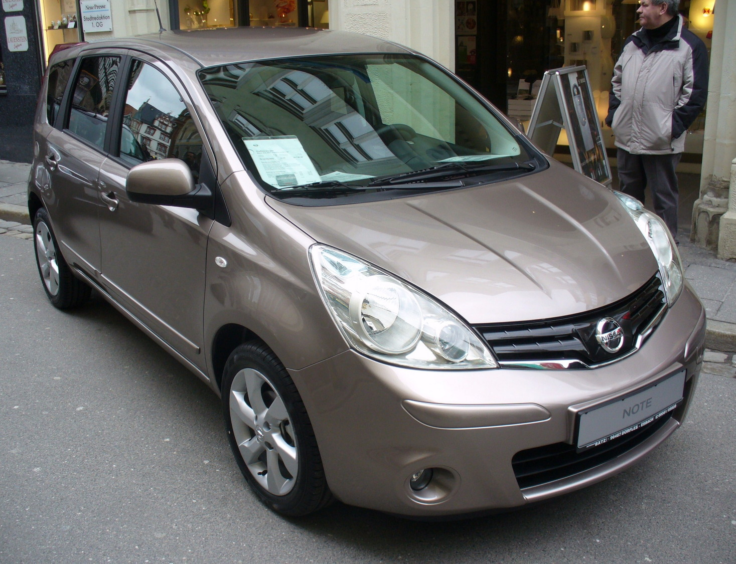 Nissan Note